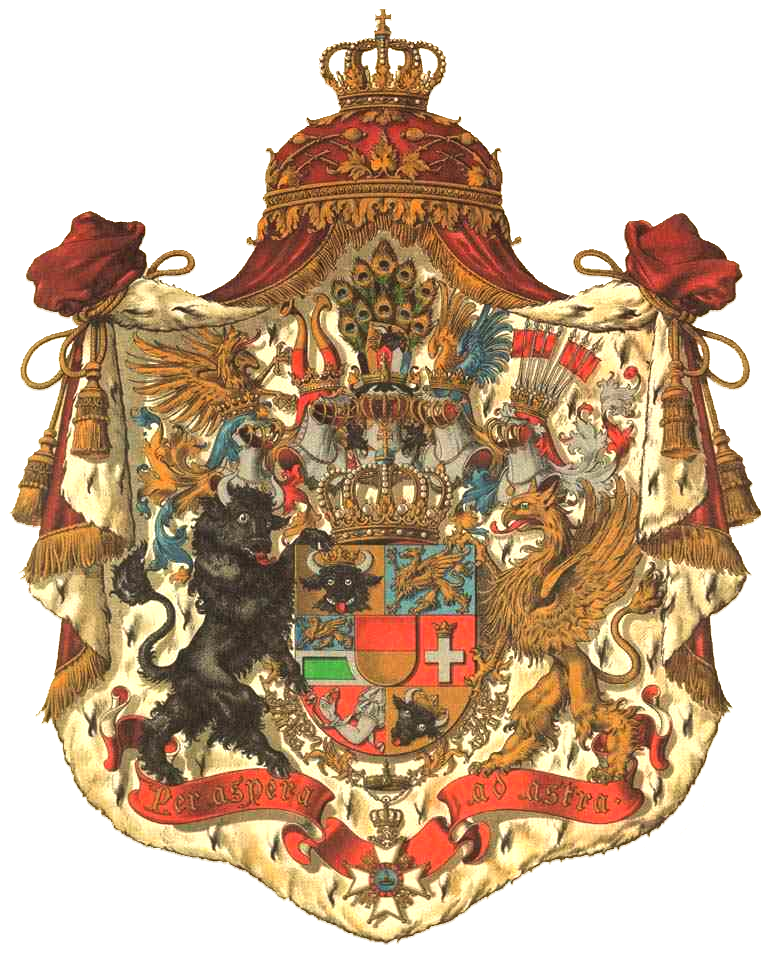 Wappen Grossherzogtum Mecklenburg-Schwerin